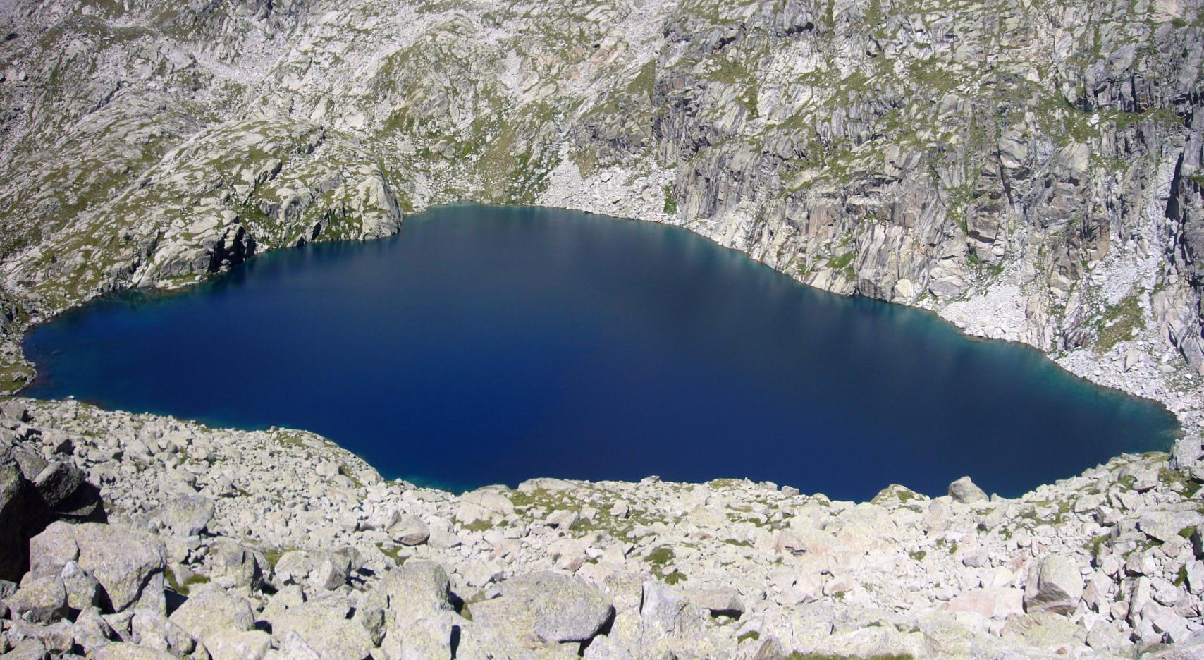 Estany del Bergús; Espot, Pallars Sobirà, Catalunya